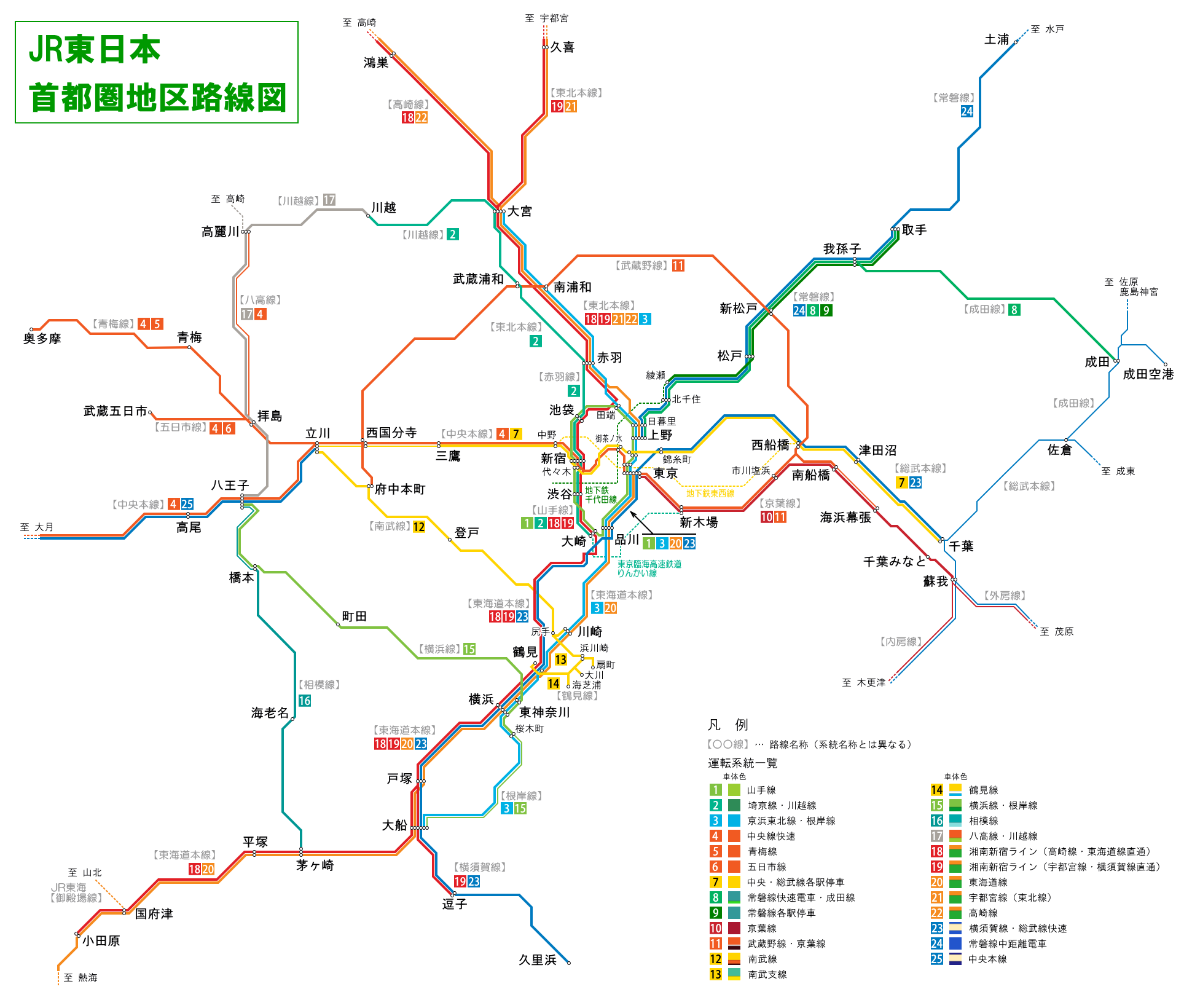 JR東日本首都圏地区路線図